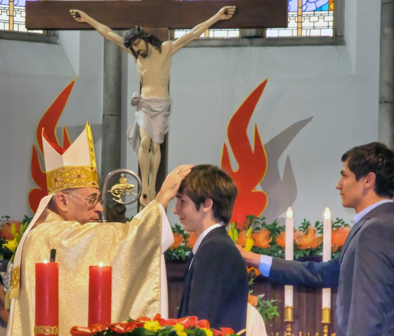 Obred svete potvrde u Kapucinskoj crkvi Gospe Lurdske u Rijeci